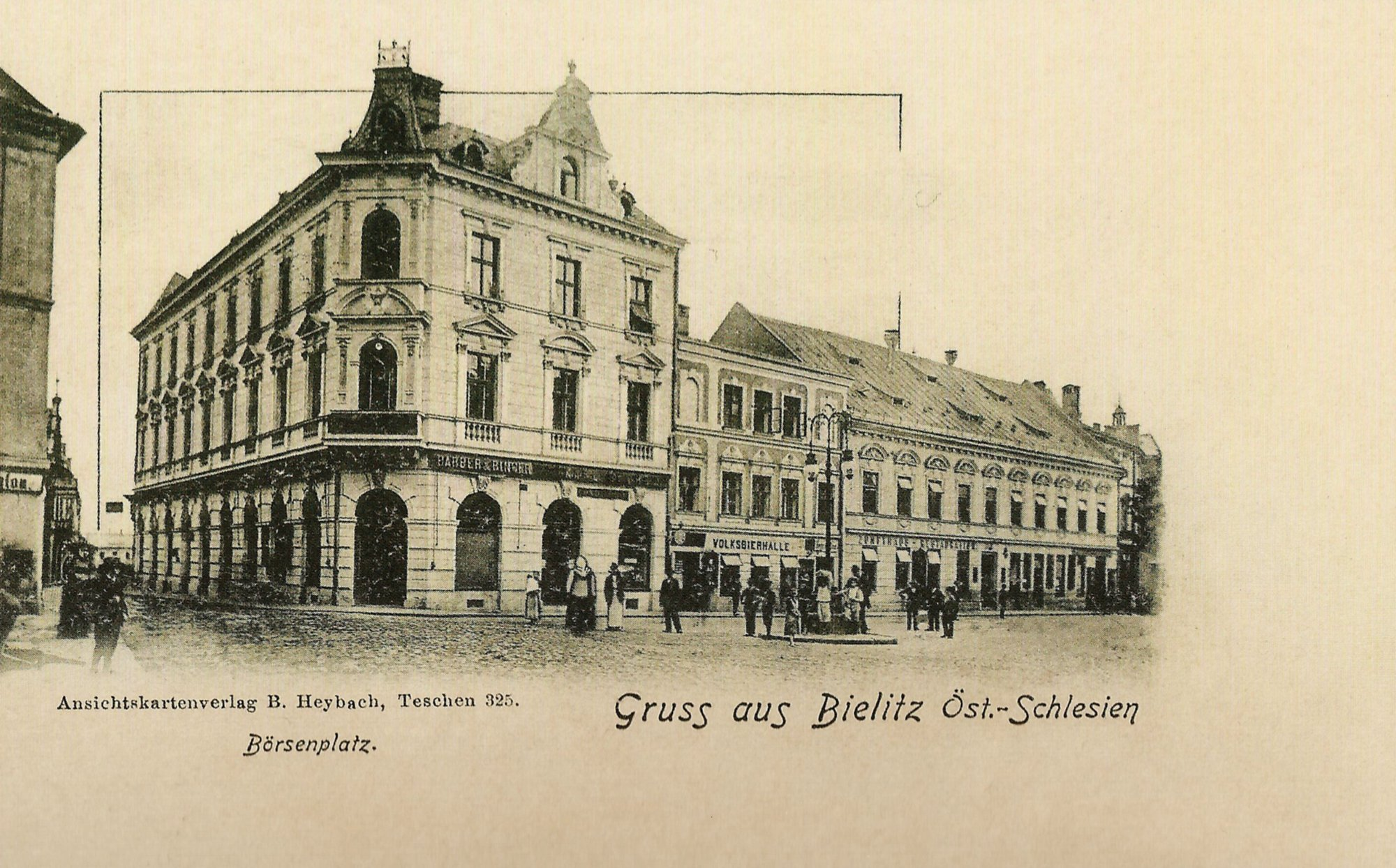 Bielsko-Biała, Börsenplatz (dziś pl. Franciszka Smolki)